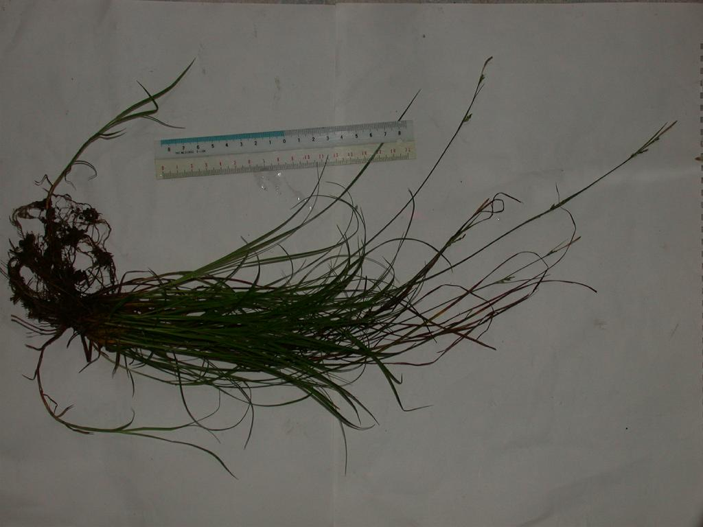 2004/05/06 和歌山県海南市：Kainan City. Wakayama Pref. Japan